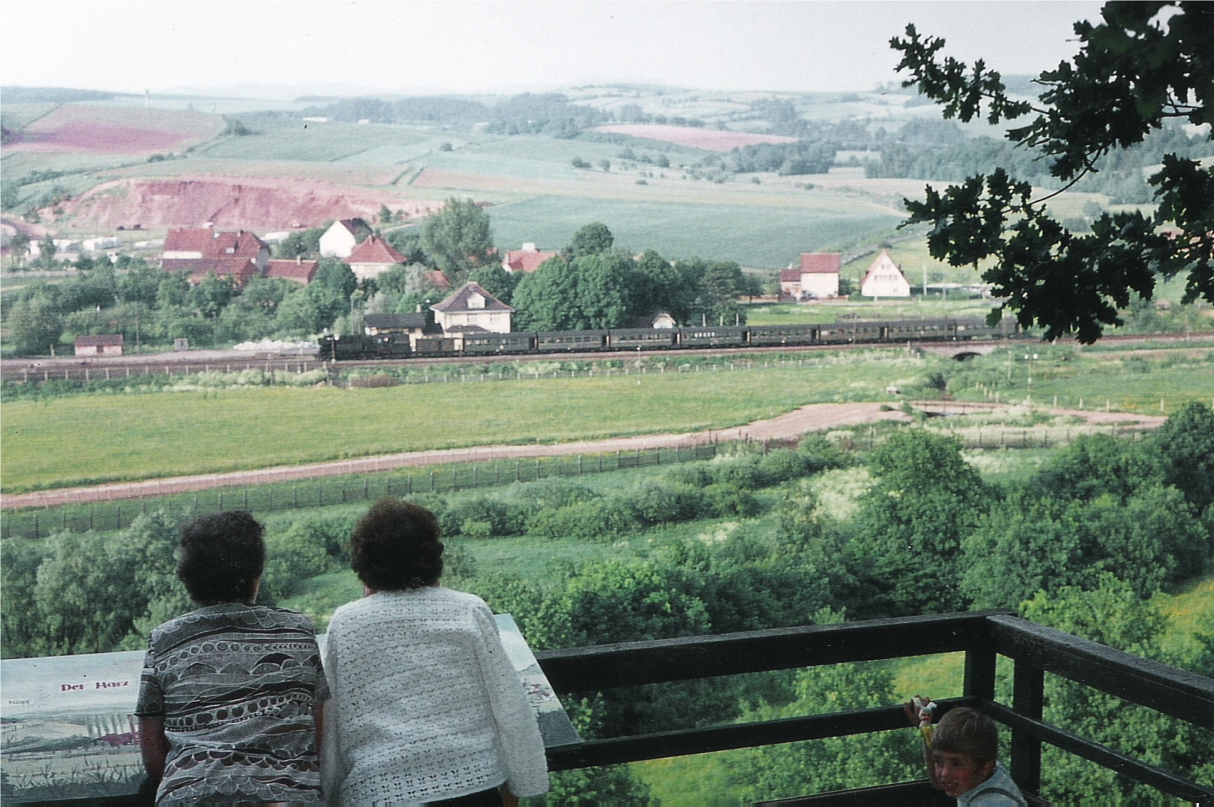 Bahnhof